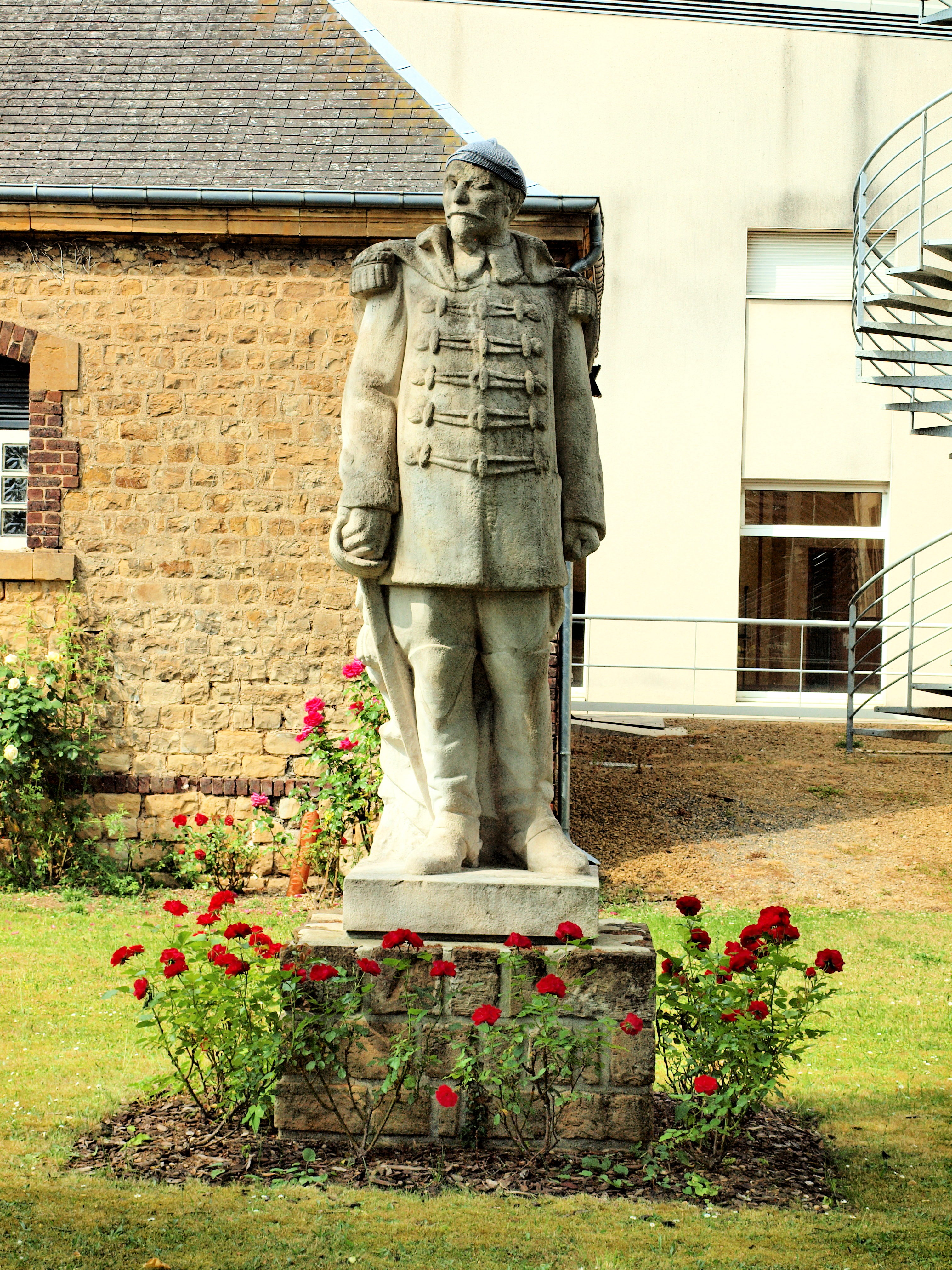 Lycée Chanzy de Charleville (Ardennes, France) ; statue d'Alfred Chanzy, coiffé d'un bonnet de laine. Au début de l'été, l'on pourrait s'imaginer une facétie de lycéens, il n'en est rien ; c'est simplement pour éviter qu'il ne porte la casquette du Père Bugeaud.